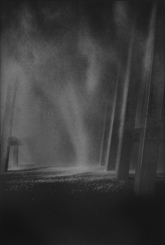 Werk von Hans Danuser aus dem Zyklaus In Vivo